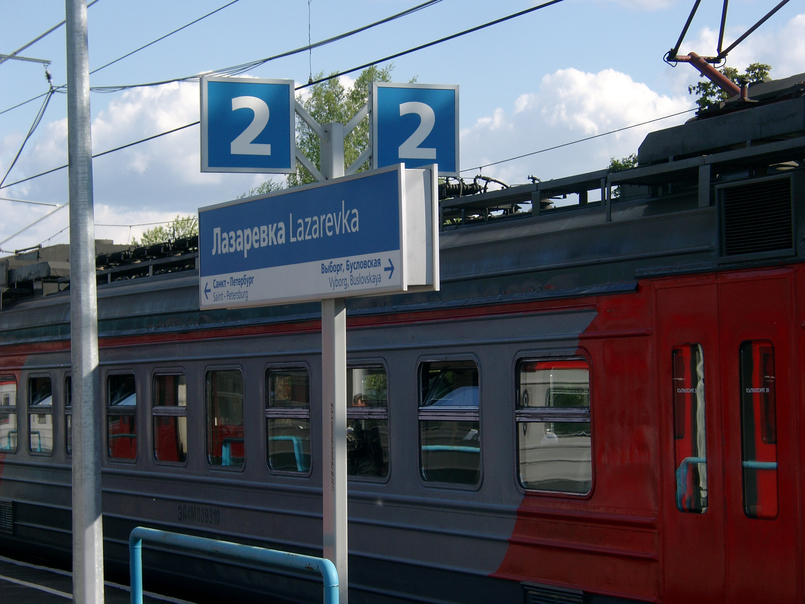 Платформа Лазаревка, Ленинградская область, Россия. Указатель с названием платформы, за ним — вагон пригородного электропоезда на Санкт-Петербург.